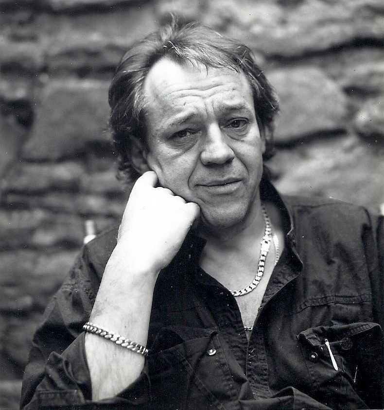 Portrait von Weiss 1994